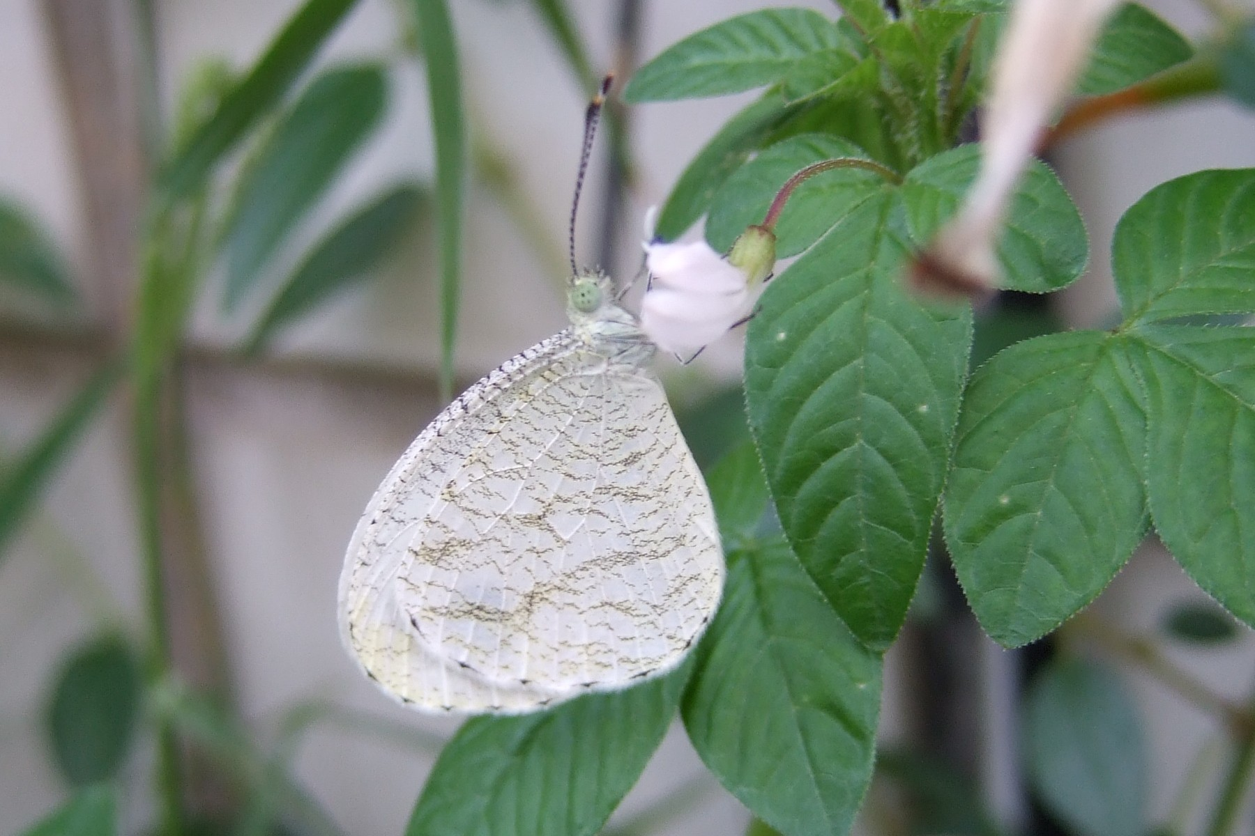 Leptosia nina - O͘-tiám-hún-tia̍p - 黑點粉蝶